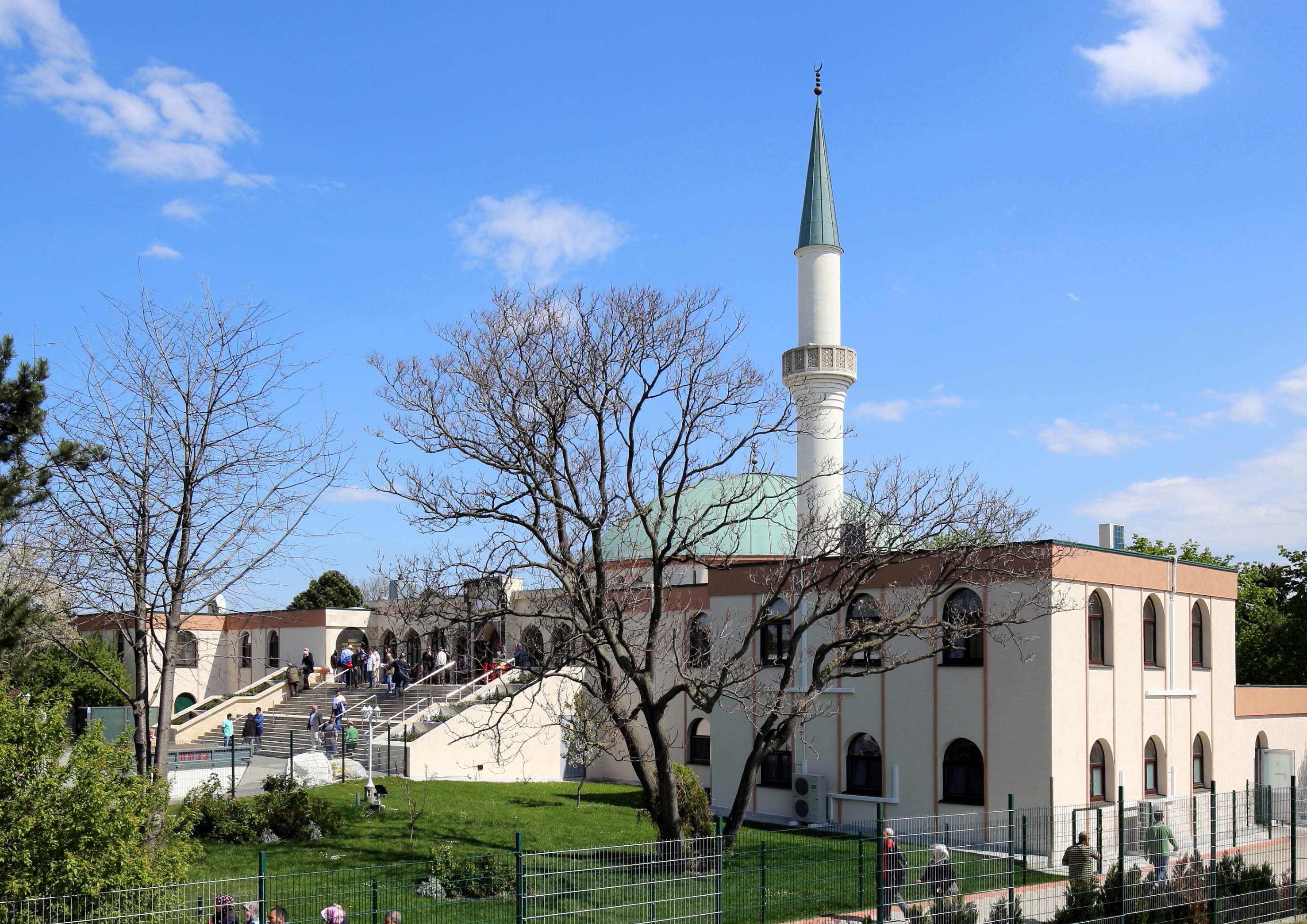 Westansicht des Islamischen Zentrum Wien in Bruckhaufen, ein Ortsteil im 21. Wiener Gemeindebezirk Floridsdorf.Die Moschee mit einem 32 m hohen Minarett und einer Kuppel mit rund 20 m Durchmesser wurde von 1975 bis 1979 von Baumeister Richard Lugner im Auftrag des saudi-arabischen Königs Faisal ibn Abd al-Aziz errichtet.